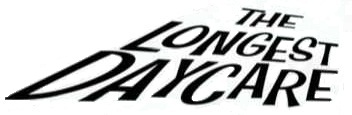 Logo des Kurzfilms "The Longest Daycare" (2012).